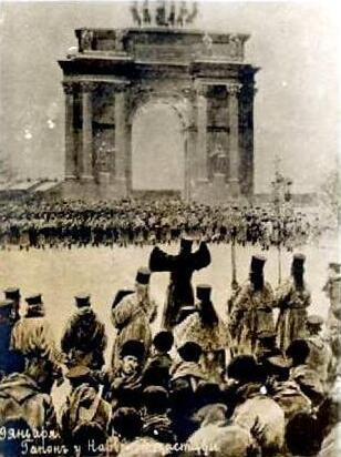 Картина неизвестного художника "9 января. Гапон у Нарвской заставы".